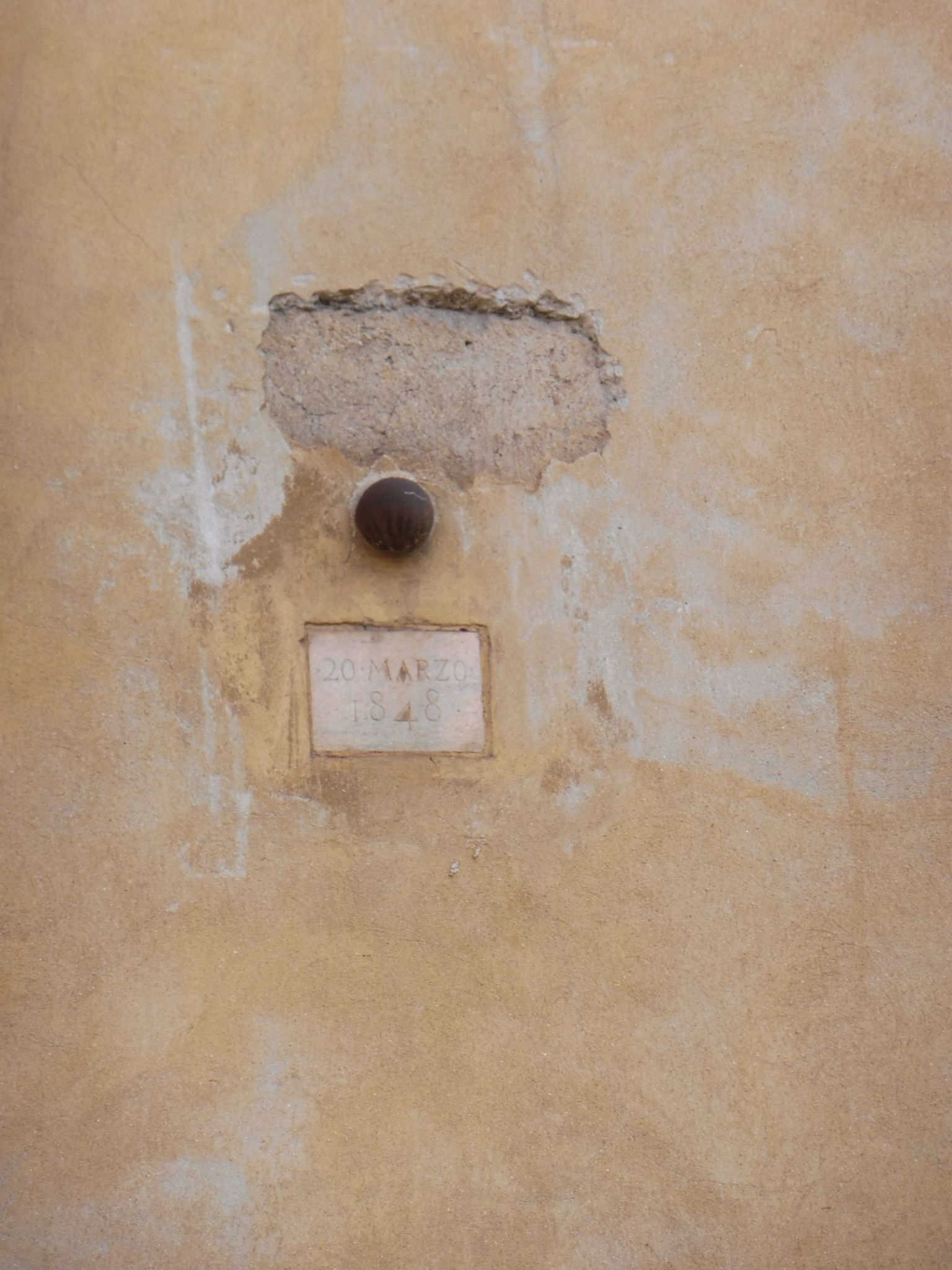 Milano, Corso di Porta Romana 3, palazzo Acerbi, la palla di cannone del 1848